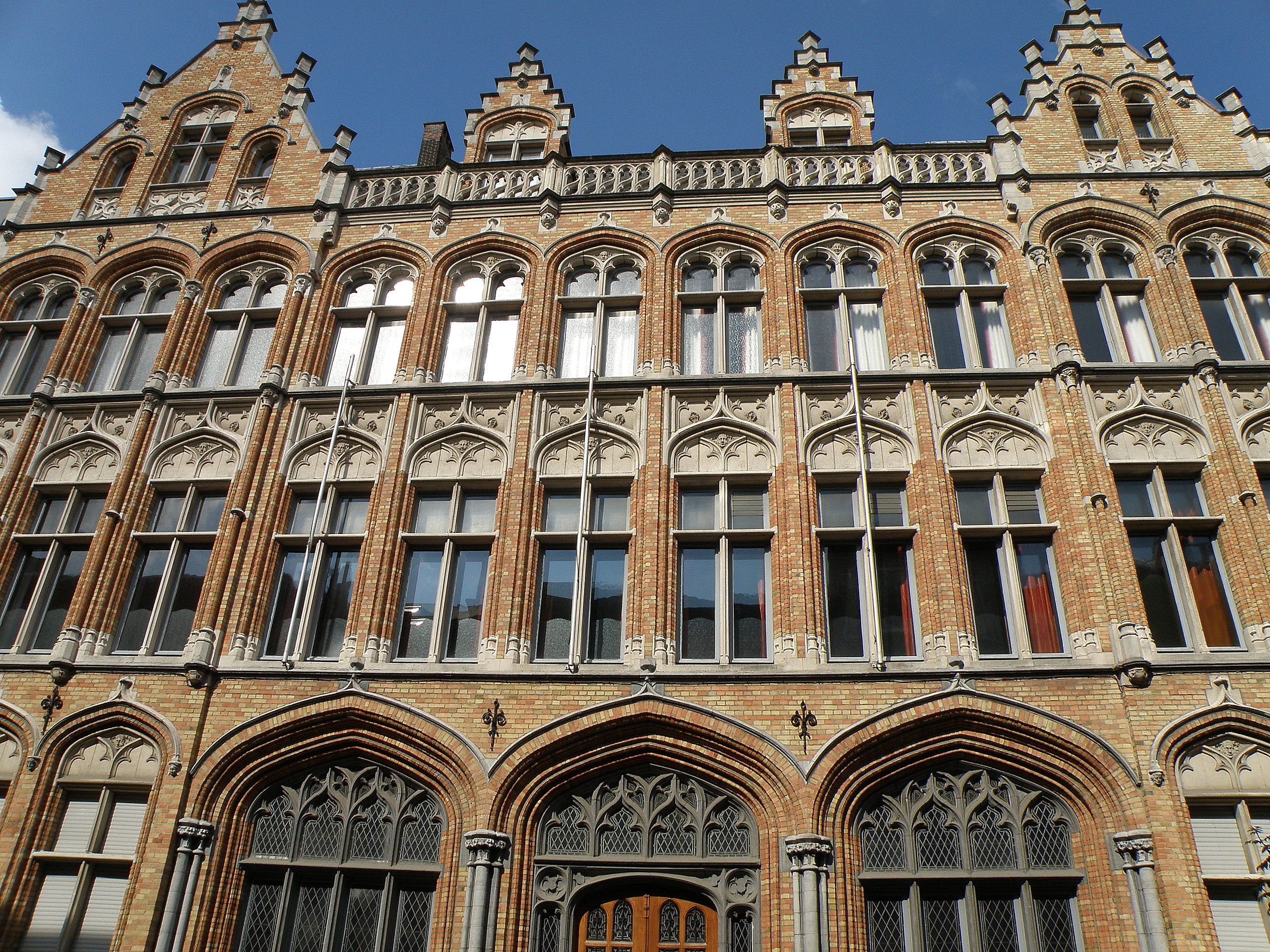 Antwerpen (België). Neogotisch Belpaire-instituut en Katholieke Vlaamse Hogeschool voor Vrouwen, aan de Jozef De Bomstraat nr.11, anno ca. 1900.